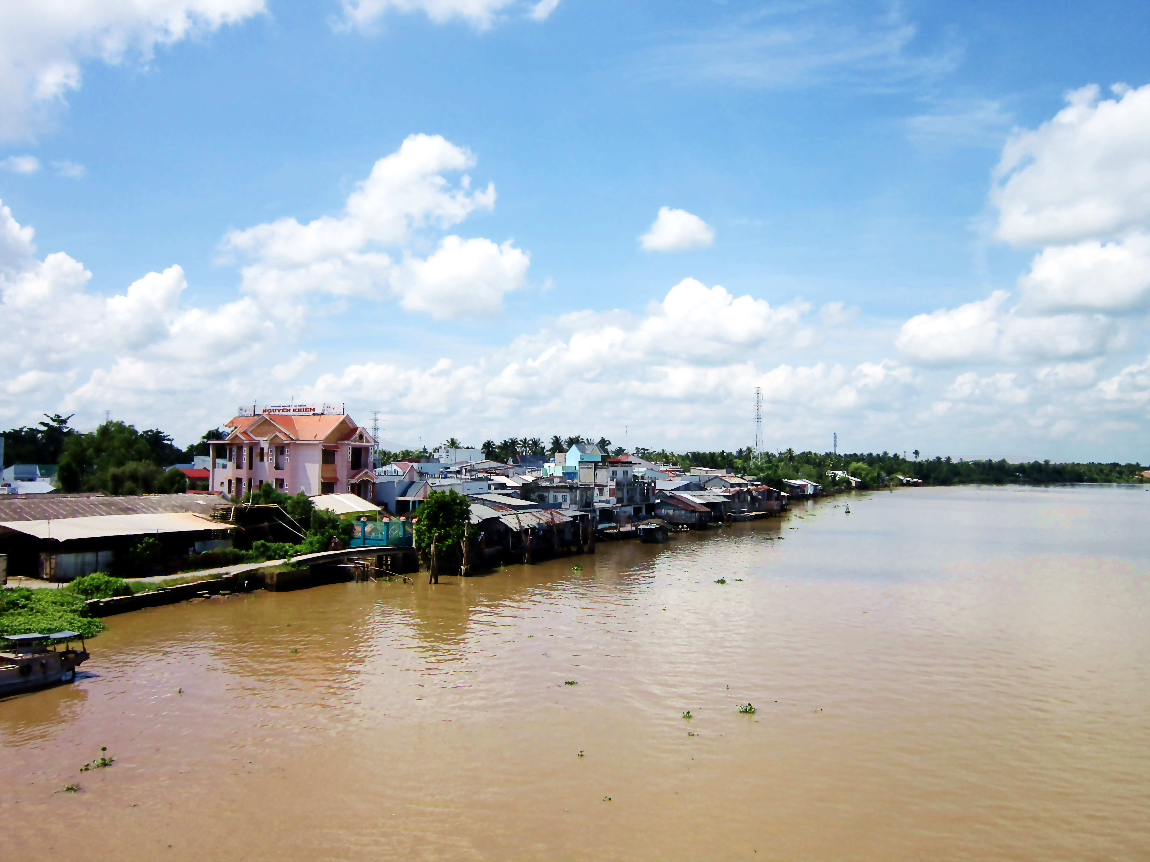 Chợ Tân An Luông bên dòng sông Măng Thít, thuộc xã Tân An Luông, huyện Vũng Liêm, tỉnh Vĩnh Long, Việt Nam.